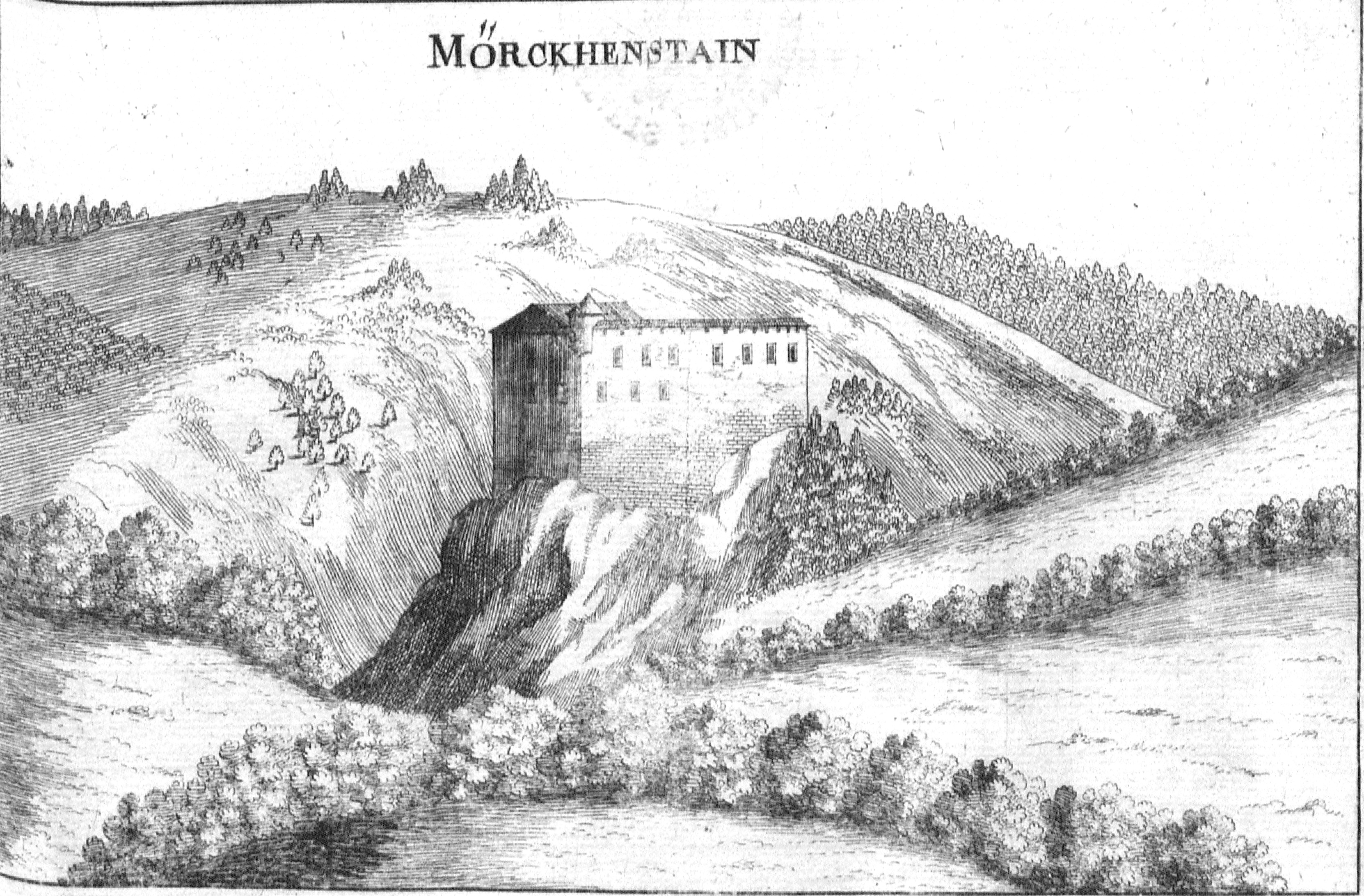 Merkenstein, Kupferstich von Georg Matthäus Vischer, 1672